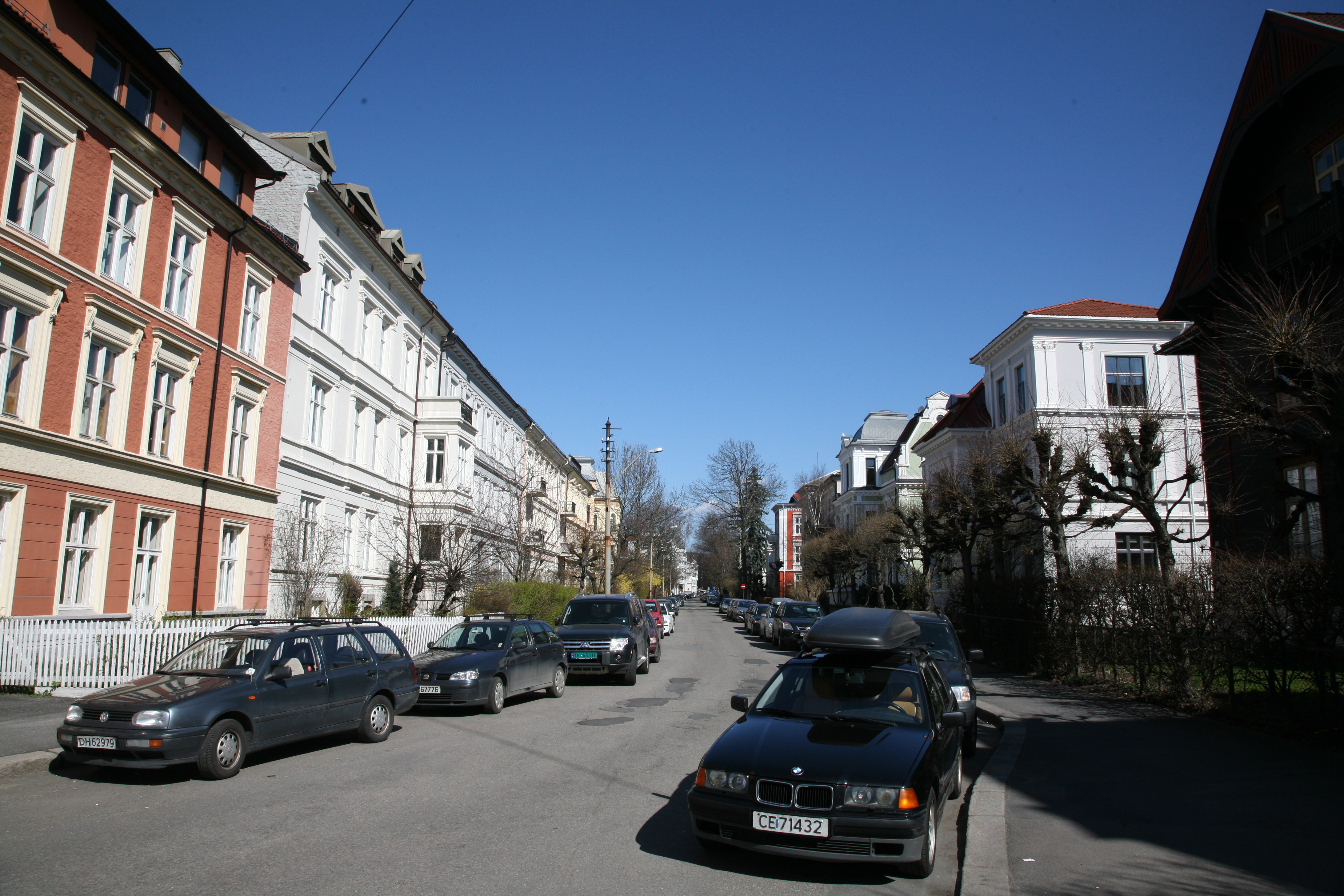 Eilert Sundts gate in Oslo